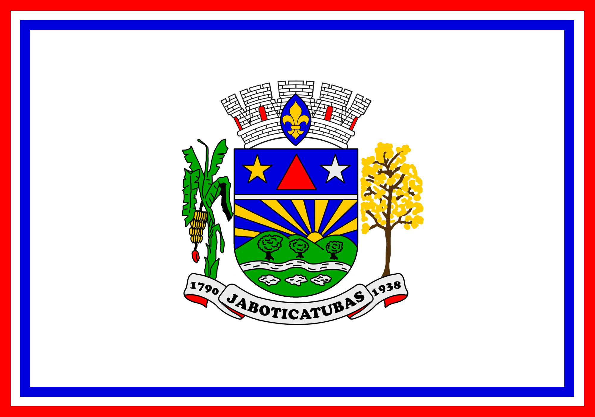 Bandeira do município de Jaboticatubas, Minas Gerais, Brasil.